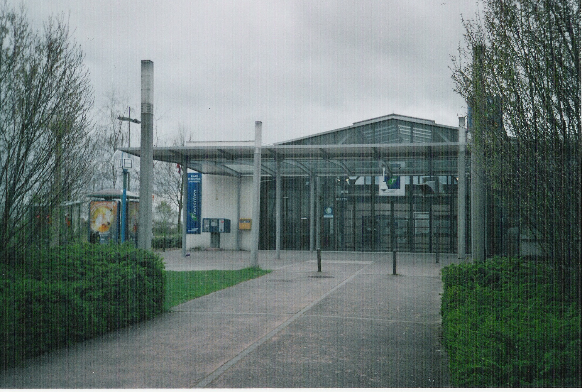 Summary Le bâtiment de la gare de Neuville Université prise le jeudi 13 avril 2006 à Neuville-sur-Oise (Val d'Oise - France). Il s'agit de la numérisation d'une photographie argentique personnelle par Cyrflo2000 (Cyril). Vers la droite, l'accès aux quais, vers la gauche, la gare routière. Licensing Catégorie:Gare du Val-d'Oise